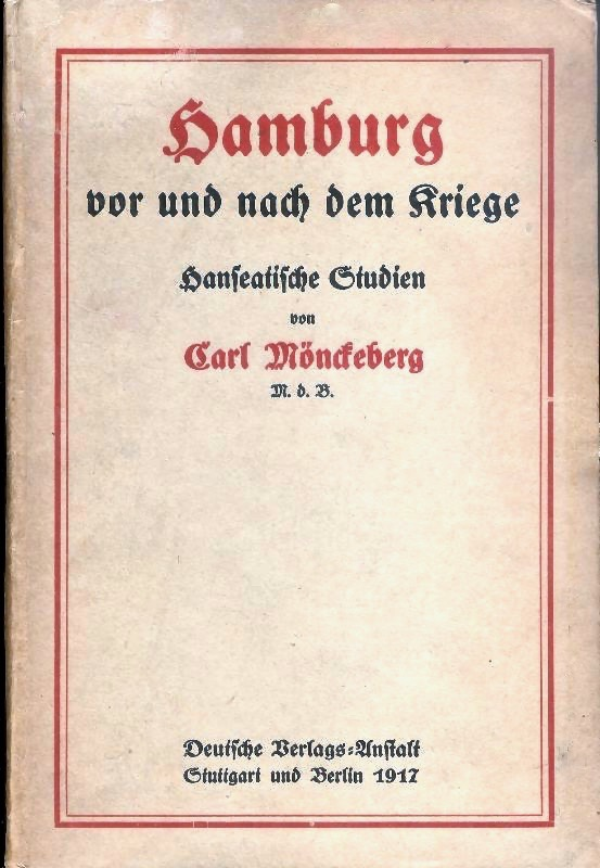 Carl Adolf Mönckeberg: Hamburg vor und nach dem Kriege. Hanseatische Studien. Deutsche Verlags-Anstalt, Stuttgart und Berlin, 1917. OCLC 475040943